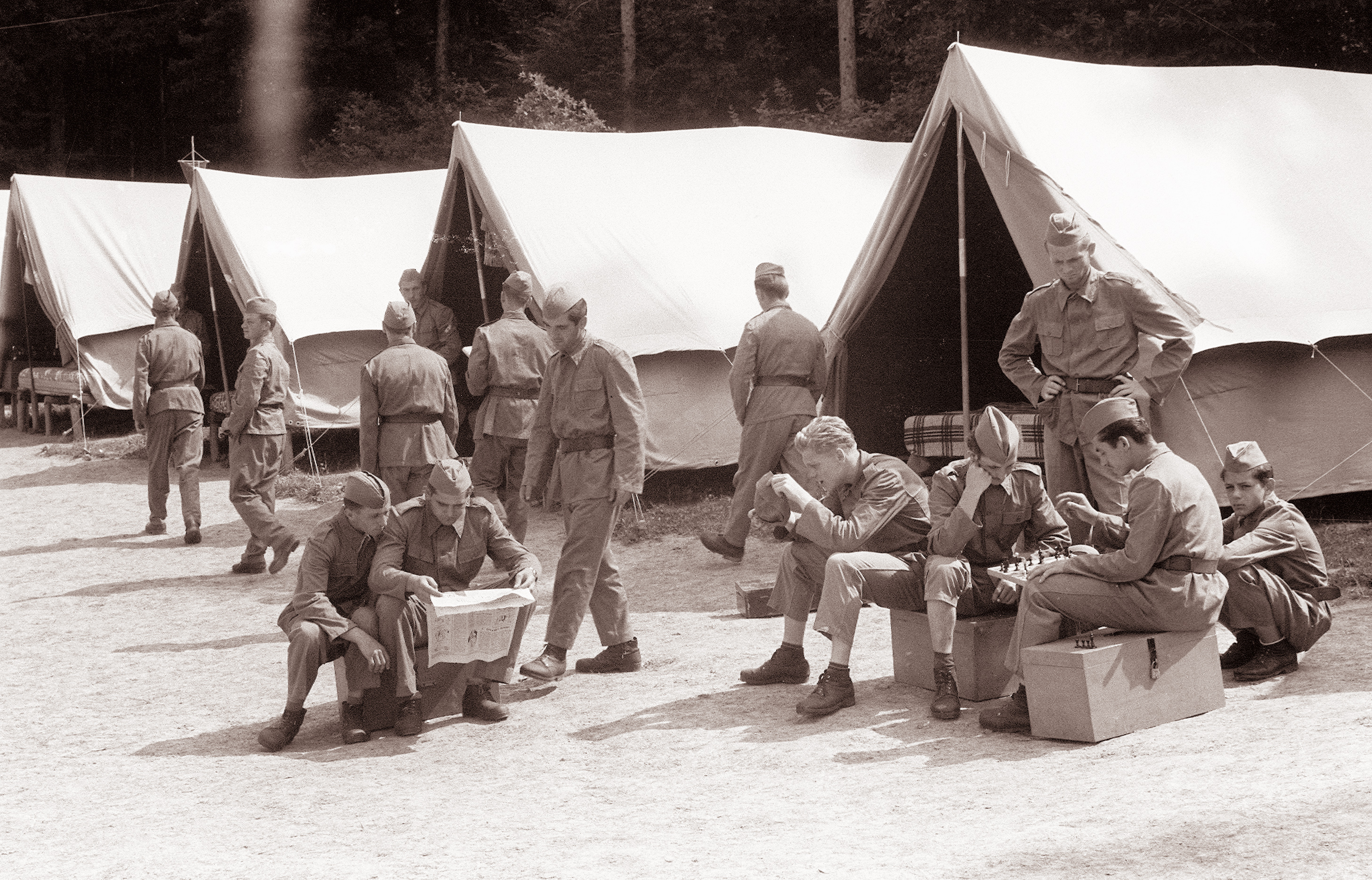 Tabor predvojaške vzgoje v Ribniškem selu